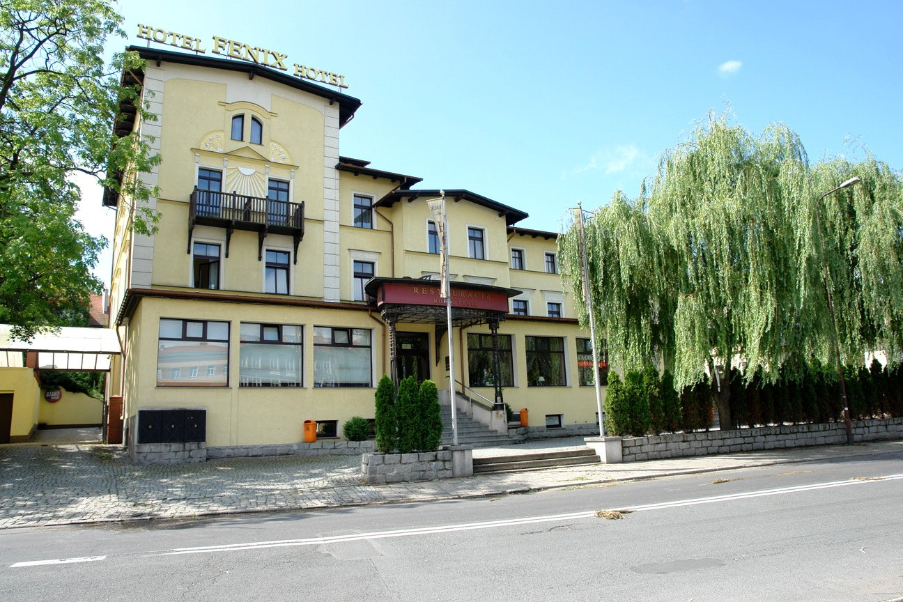 hotel „Fenix”, dawniej dom wycieczkowy PTTK, 1909 ul. 1 Maja 88, Jelenia Góra, Polska